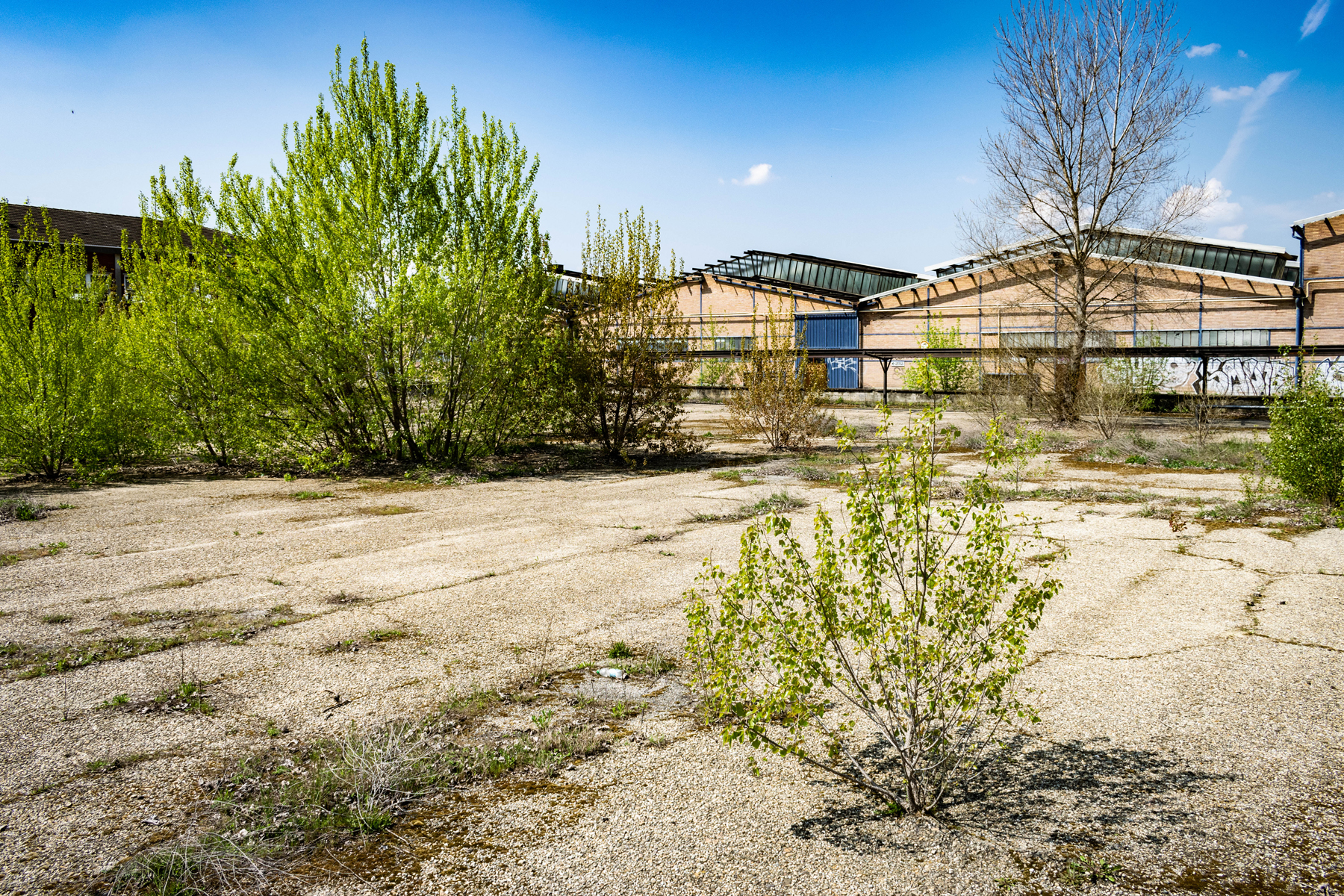 La grande distesa del piazzale destinato al parcheggio degli operai.